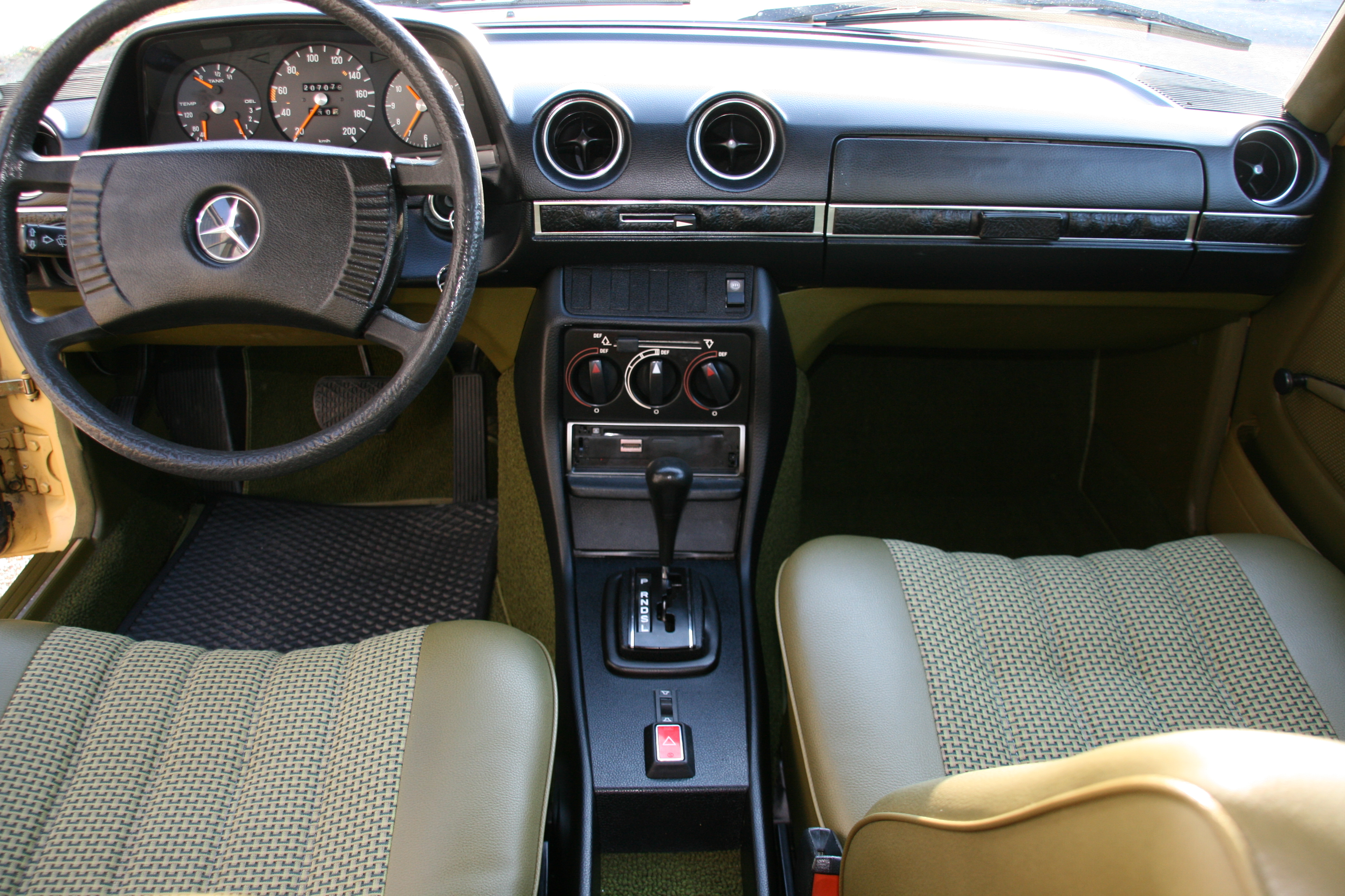 Armaturenbrett W123 230 Automatic aus 1977, erste Serie